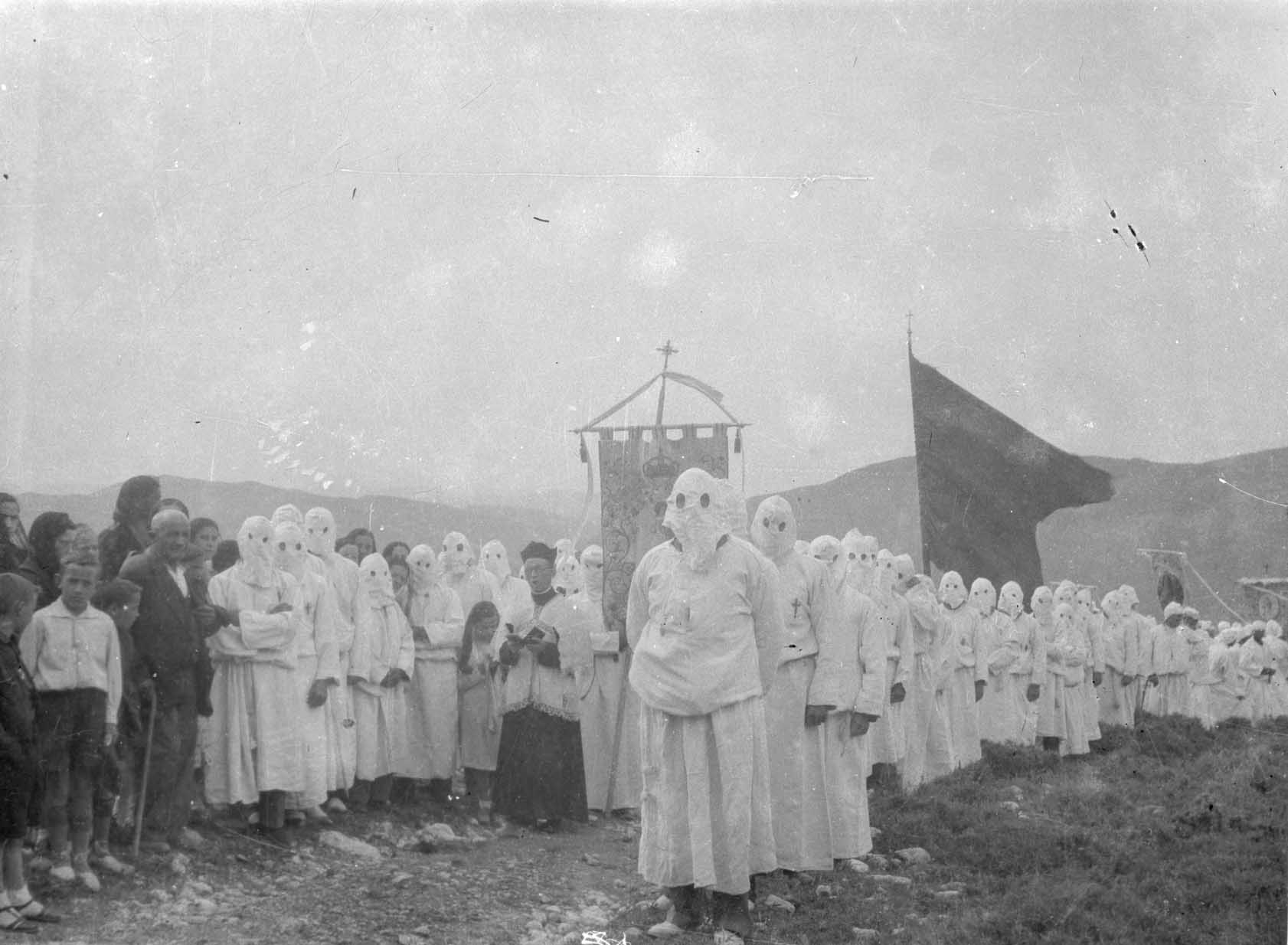 Gurutzearen Kofradiaren prozesioa.